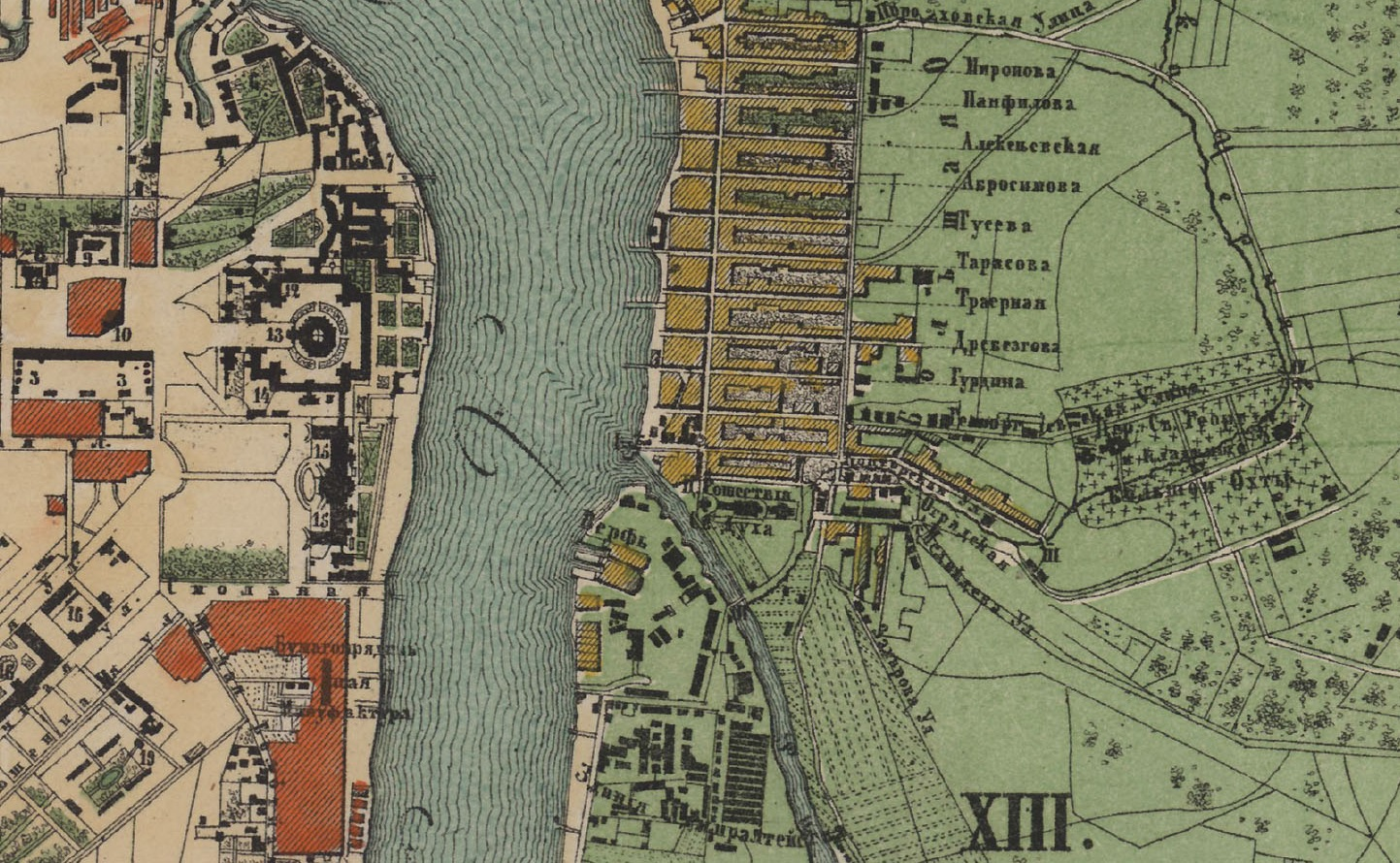 Карта Охтенской верфи